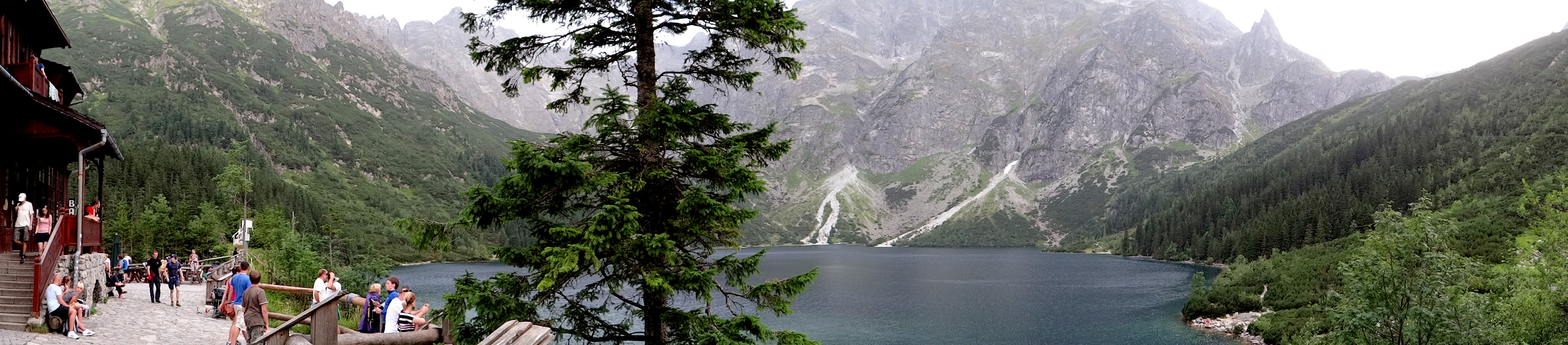 schronisko im. St. Staszica nad Morskim Okiem - nowe Morskie Oko, Bukowina Tatrzańska